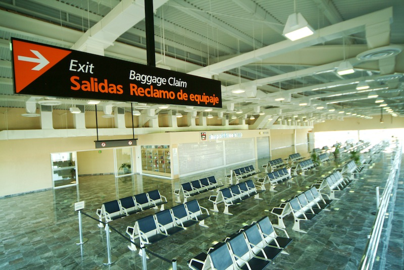 Aeropuerto de Guanajuato